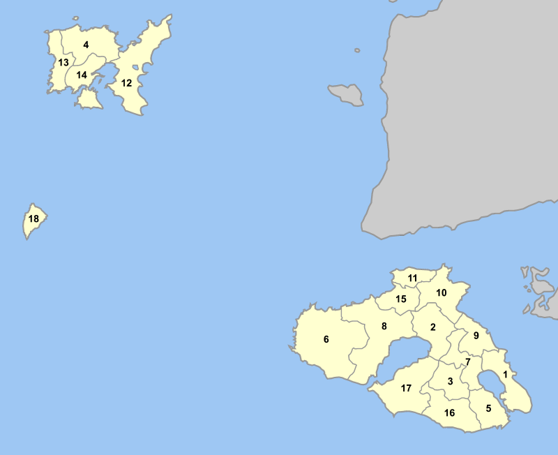 Map of LEsbos prefecture (Greece) with administrative divisions (municipalities and communities) numbered in alphabetical order (in greek). Legend: 1. Δήμος Μυτιλήνης - Mytilini 2. Δήμος Αγίας Παρασκευής - Agia Paraskevi 3. Δήμος Αγιάσου - Agiasos 4. Δήμος Ατσικής - Atsiki 5. Δήμος Γέρας - Gera 6. Δήμος Ερεσού-Αντίσσης - Eresos-Andissa 7. Δήμος Ευεργέτουλα - Evergetoulas 8. Δήμος Καλλονής - Kallioni 9. Δήμος Λουτροπόλεως Θερμής - Loutropolis Thermis 10. Δήμος Μανταμάδου - Mandamados 11. Δήμος Μήθυμνας - Mithymna 12. Δήμος Μούδρου - Moudros 13. Δήμος Μύρινας - Myrina 14. Δήμος Νέας Κούταλης - Nea Koutali 15. Δήμος Πέτρας - Petra 16. Δήμος Πλωμαρίου - Plomari 17. Δήμος Πολιχνίτου - Polichnitos 18. Κοινότητα Αγίου Ευστρατίου - Agios Efstratios